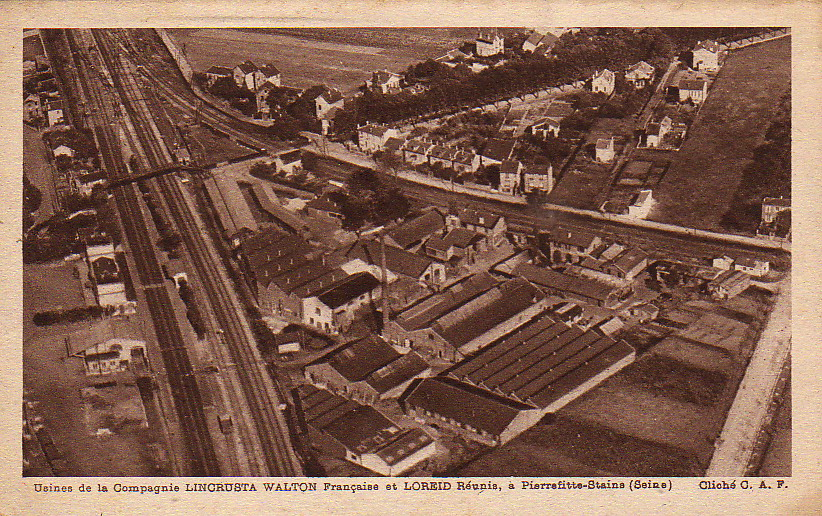 Carte postale ancienne, éditée par C. A. F. : Usines de la Compagnie LINCRUSTA WALTON Française et LOREID Réunis, à Pierrefitte-sur-Seine (Seine)